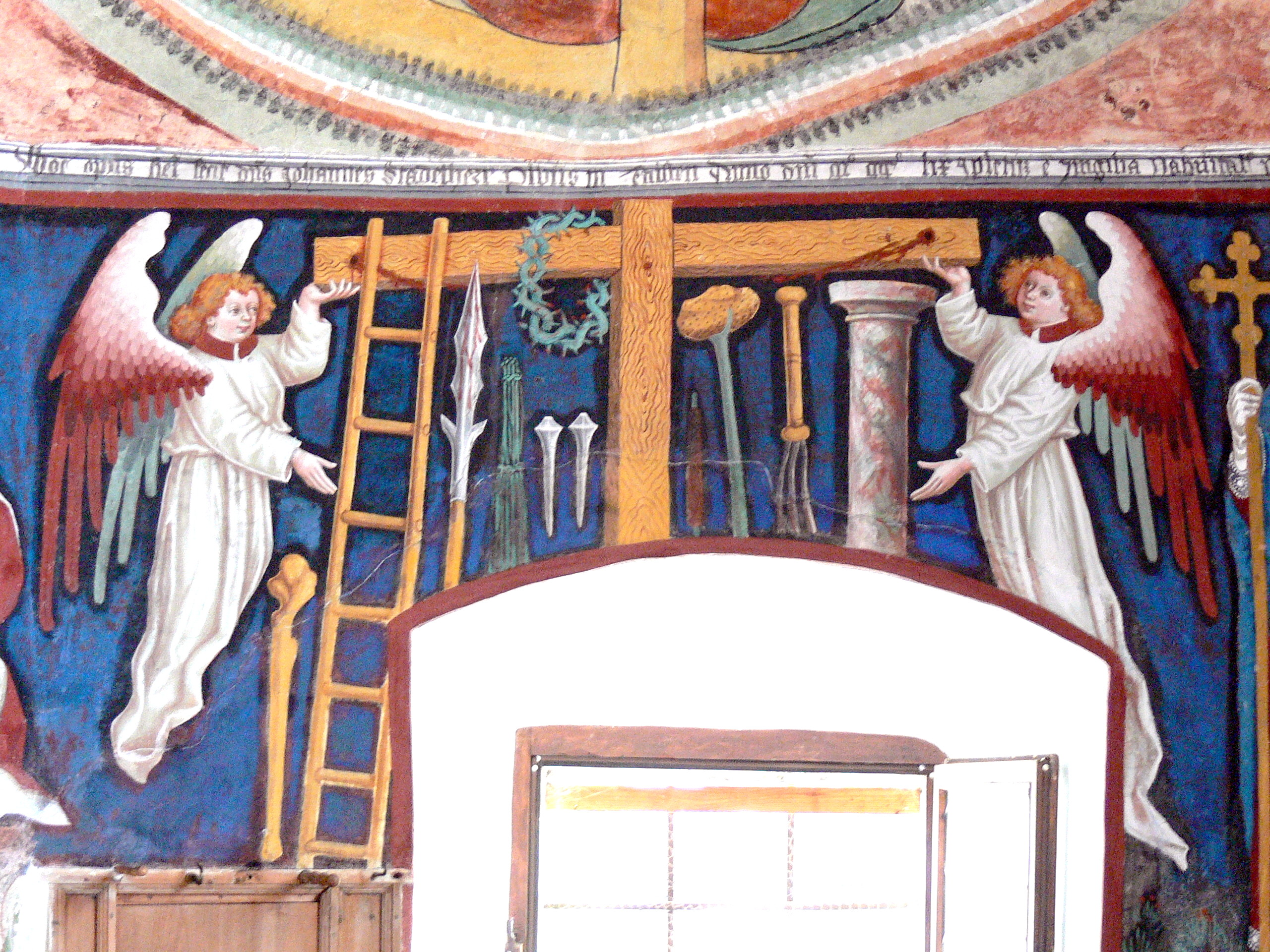 St.Georg in Taisten. Fresco des Leonhard von Brixen ( 1459 ): Engel mit Arma Christi